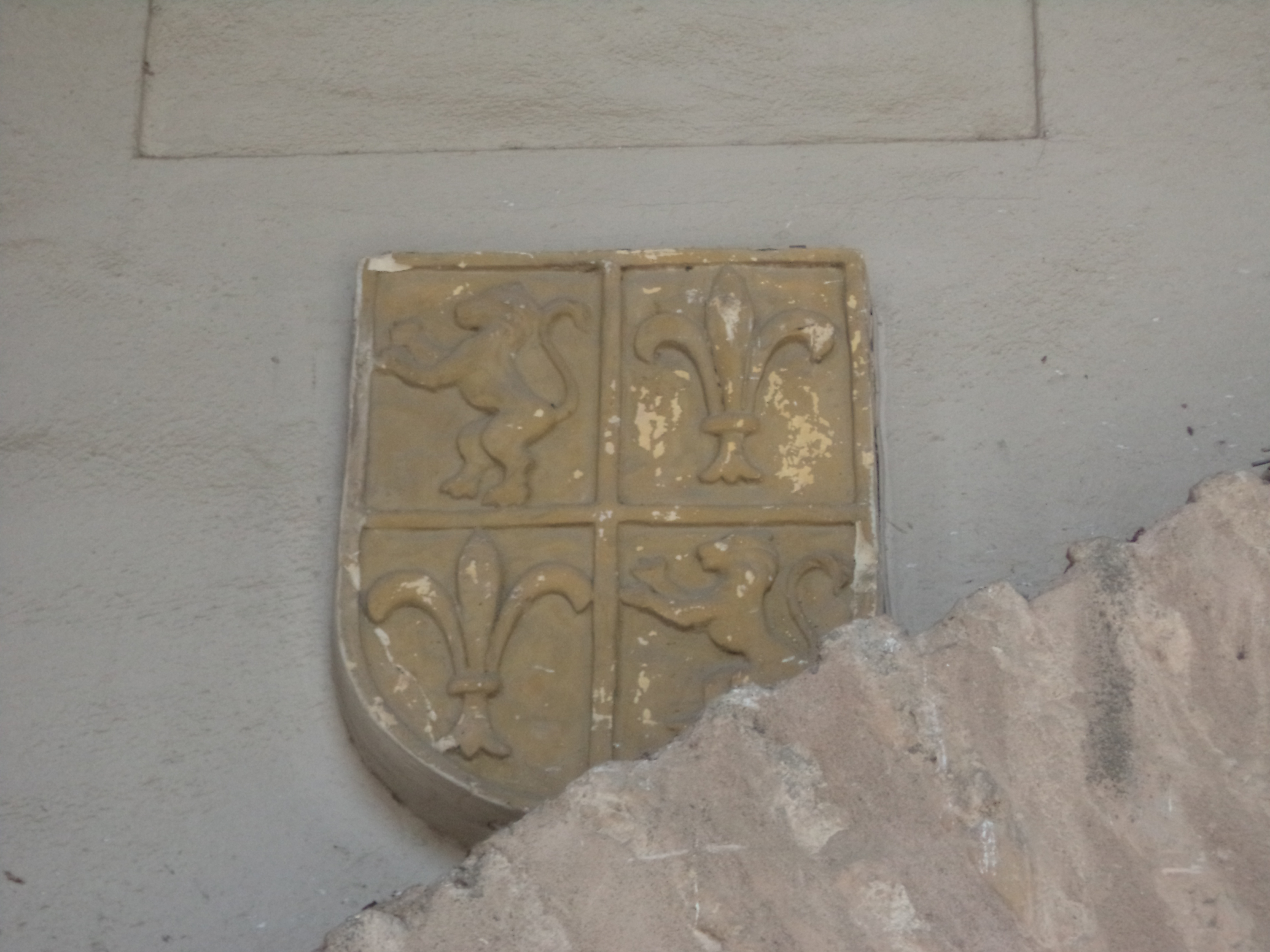 Escudo de una rama leonesa del apellido García en la galería del Patio de los Naranjos de la Catedral de Sevilla. Se encuentra repetido 3 veces: a la izquierda, centro y derecha de un arco